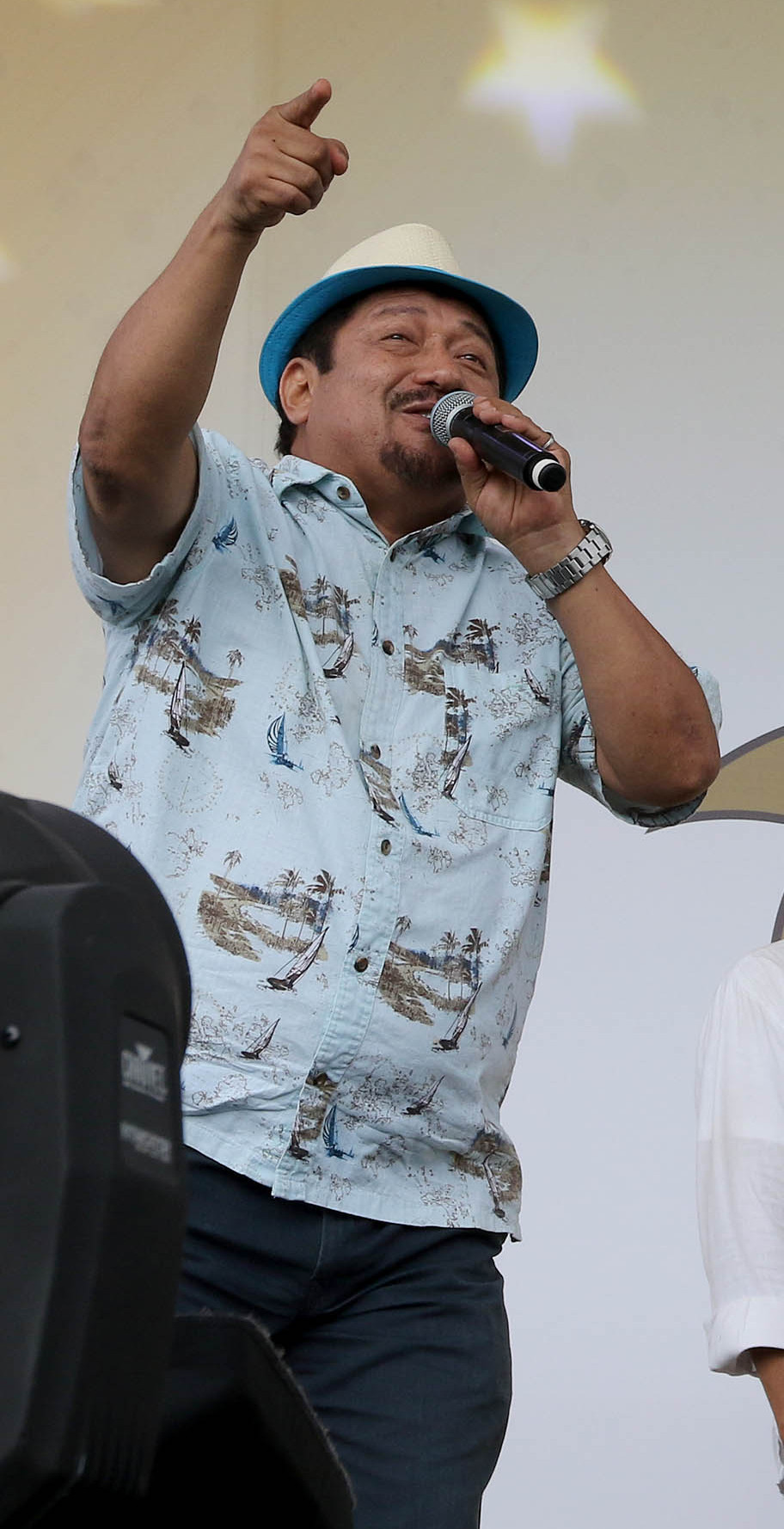 Manta, 16 de ago del 2015 (andes).-En la ciudad de Manta se realiza el primer Campeonato Mundial del Encebollado, en la gráfica el cantante Aladino durante su intervención musical Foto:César Muñoz/Andes